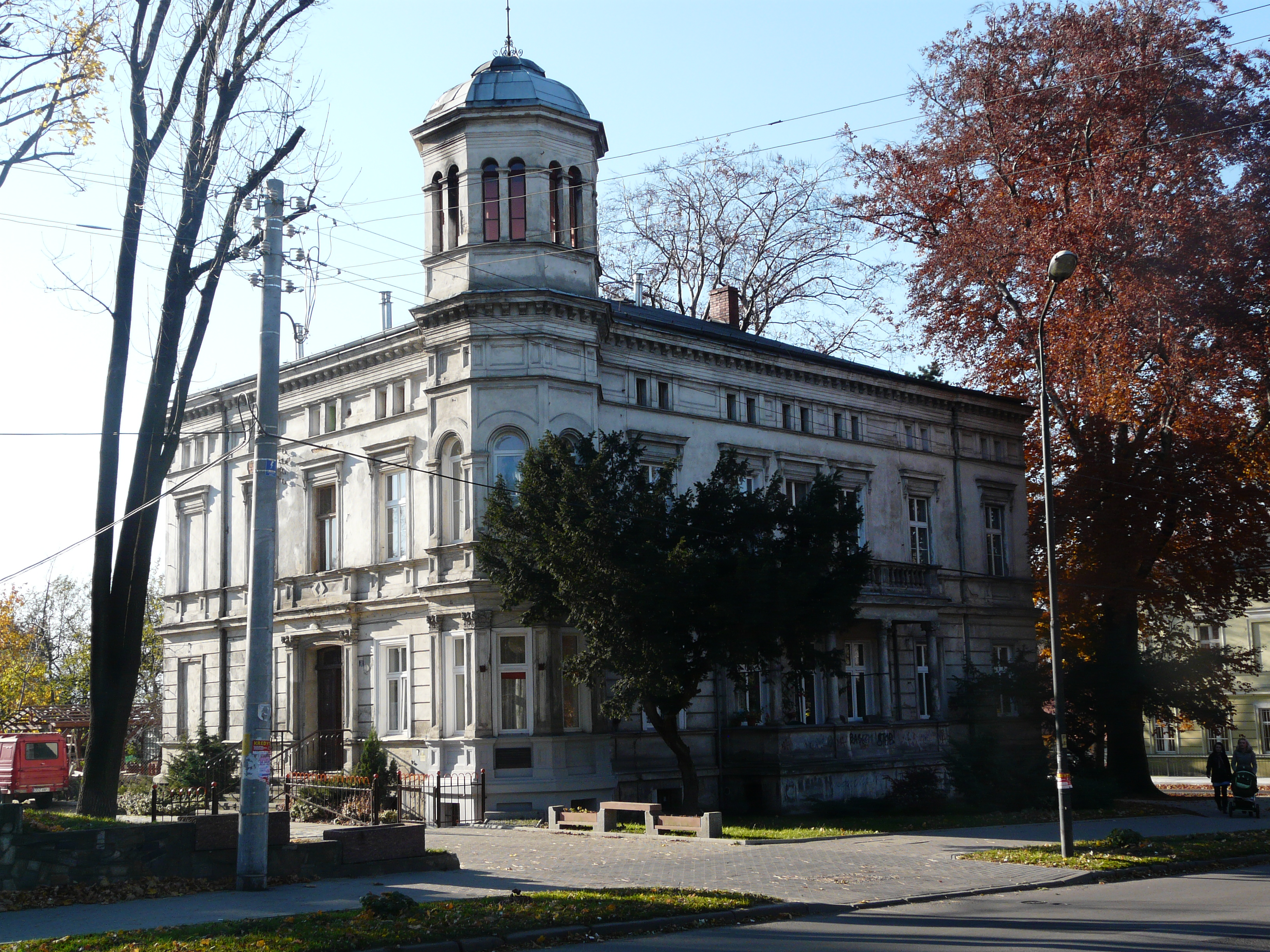 Dzierżoniów - kamienica na Świdnickiej